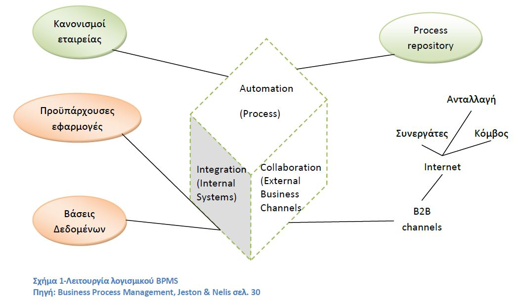 Λειτουργία Λογισμικού BPMS